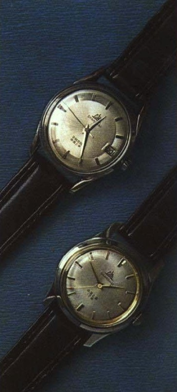 1965-9 1960年代的上海牌手表 上为日历表